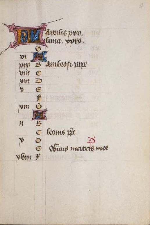 Sachsenheim-Gebetbuch, fol. 7r., Kalendar, Eintrag am 13. April durch den Auftraggeber des Stundenbuchs (Landhofmeister Hermann von Sachsenheim oder Jörg von Sachsenheim): „obitus matris mee“ (Tod meiner Mutter).